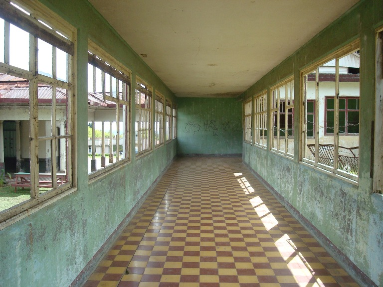 Pasillo en el Sanatorio Durán. Nótese que la cerámica es muy similar a la que se puede observar en los salones más antiguos del Hospital San Juan de Dios.